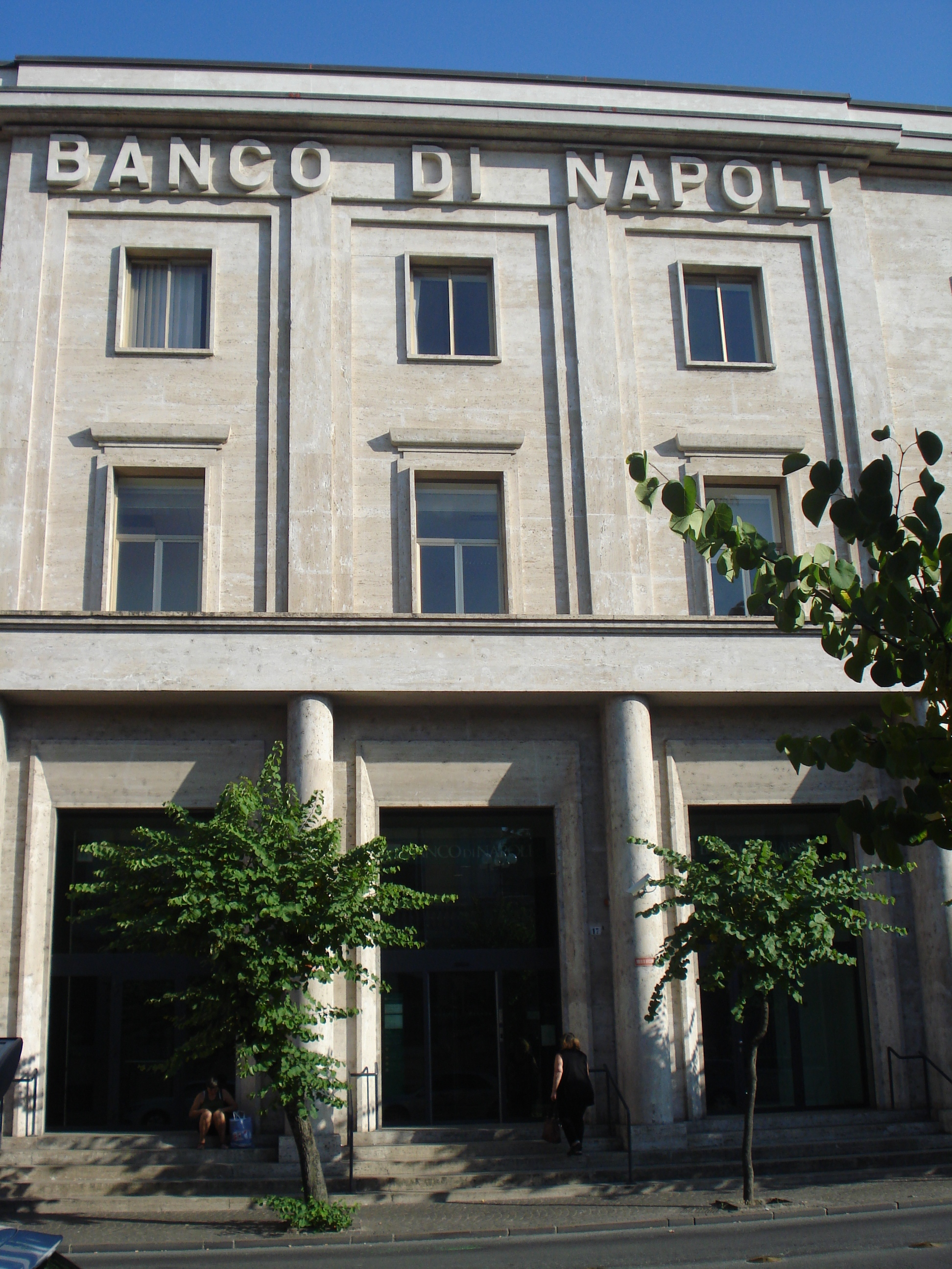 Edificio Banco di Napoli su Corso Umberto a Cosenza